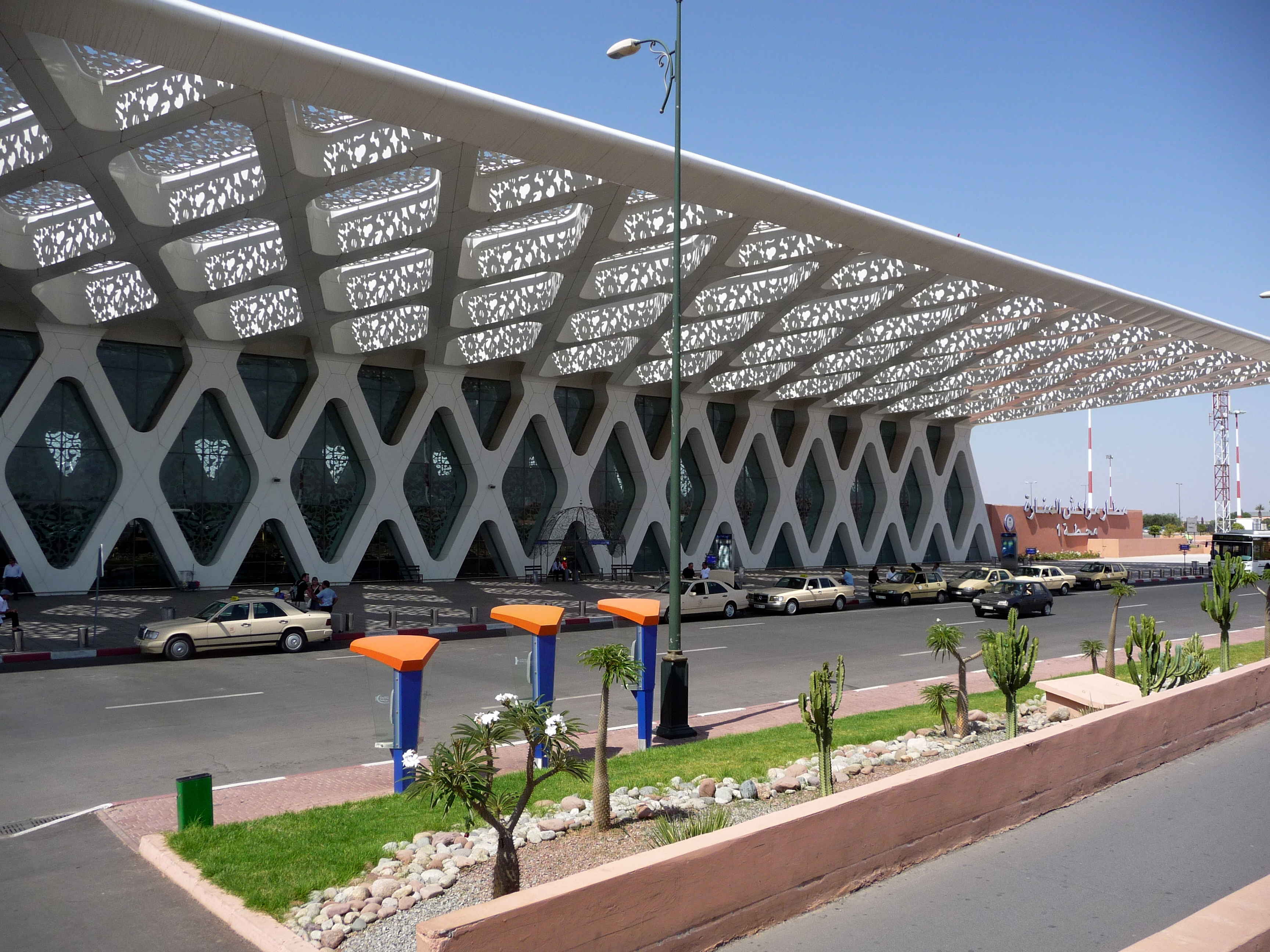 2010-06-22 - Marrakesch - Flughafen